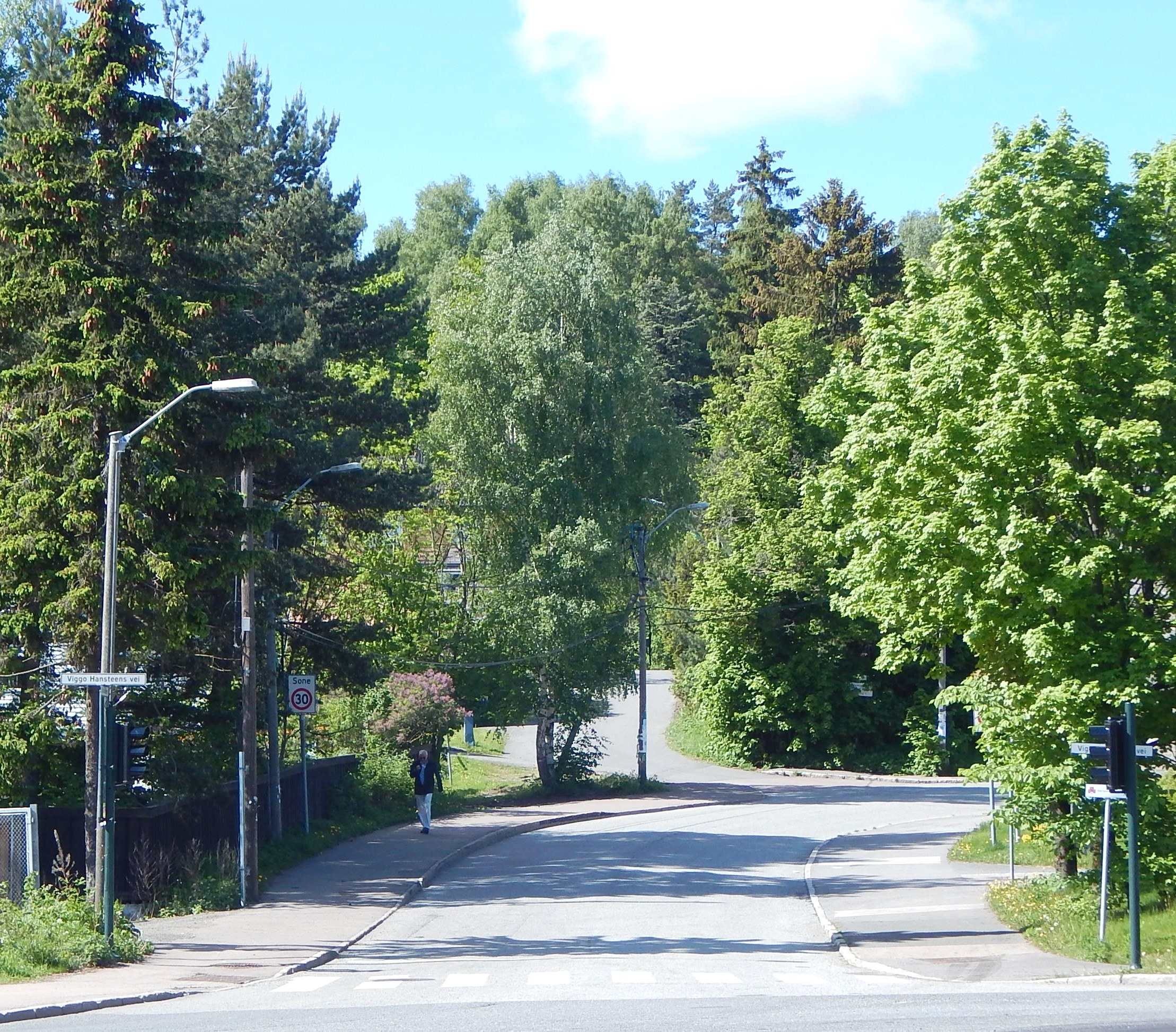 Dalsveien på nordsiden av Viggo Hansteens vei